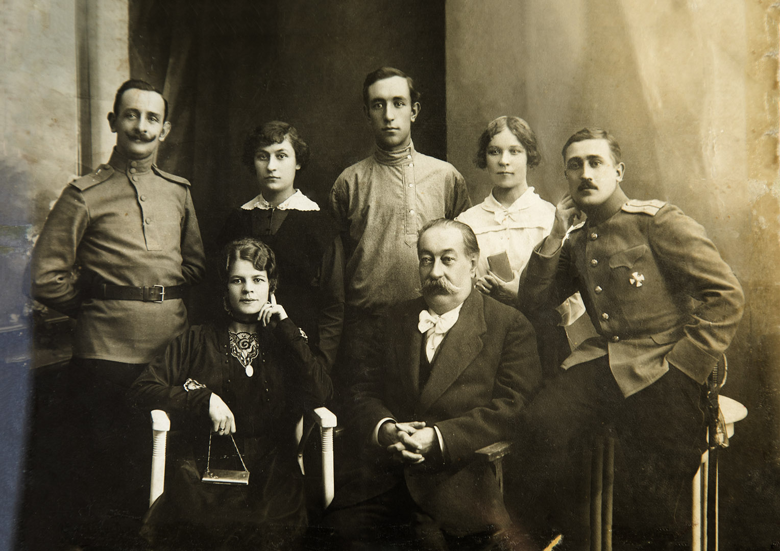 Сидят слева-направо: Александра Ильинична Виламова (вторая жена Ванченко), К. И. Ванченко (ее муж). Второй ряд слева: Сергей Константинович Писанецкий (сын Константина). Второй ряд в центре (предположительно) Анатолий Константинович Ванченко-Писанецкий